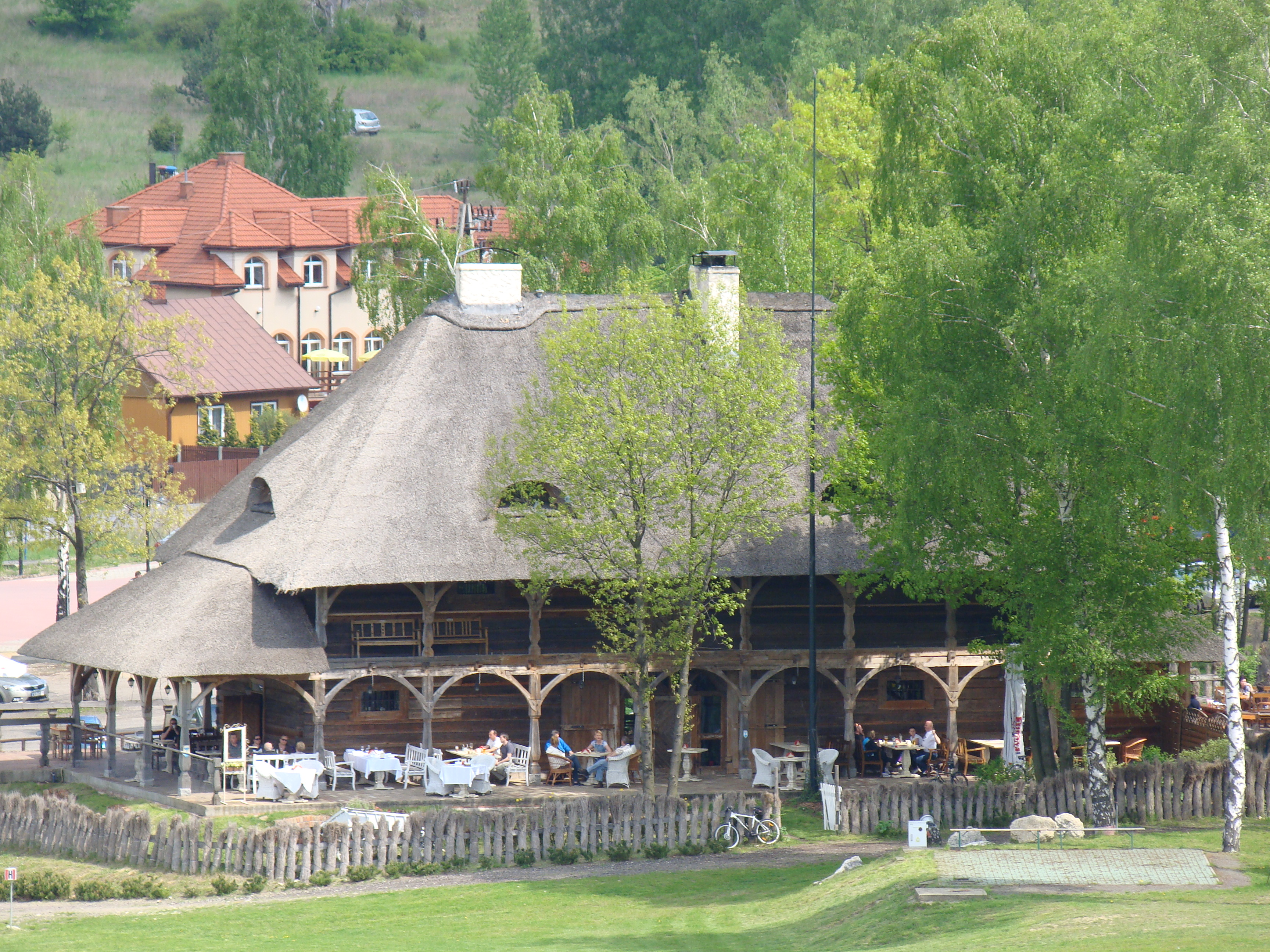 Olsztyn (przeniesiony z Borowna), spichrz